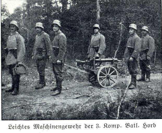 Leichtes MG 08/15 (3. Kompanie württembergisches Landsturm-Bataillon XIII/5 Horb)